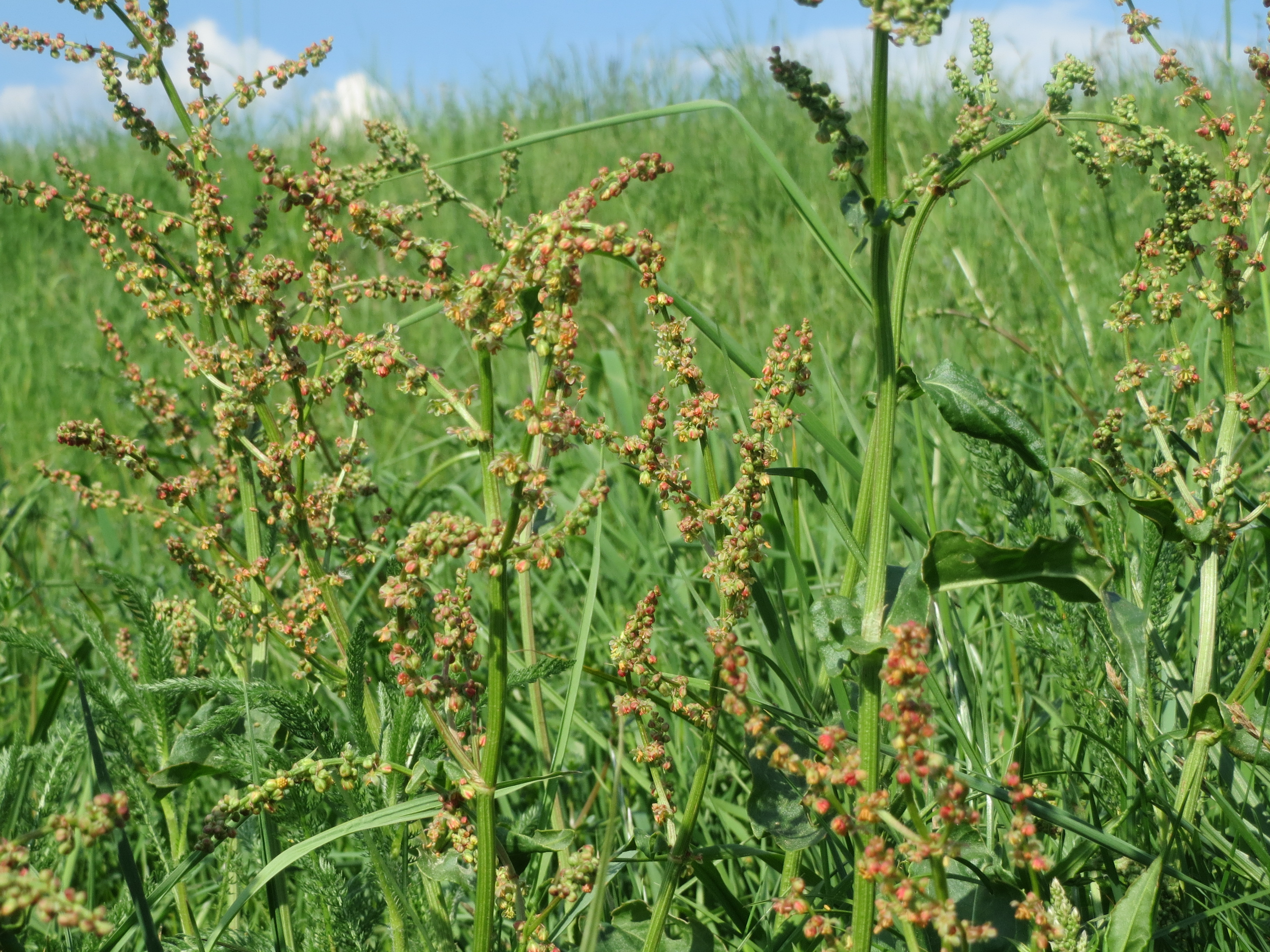 Wiesen-Sauerampfer (Rumex acetosa) am Kraichbach im Hockenheimer Rheinbogen